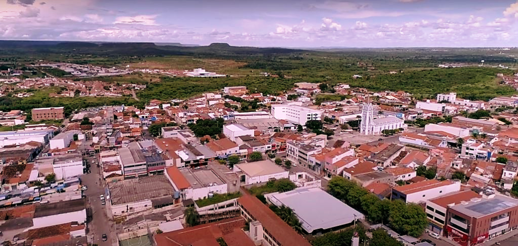 Vista parcial do principal centro comercial da Araripina que é a princesa do sertão pernambucano. Detalhes para as serras da chapada do araripe